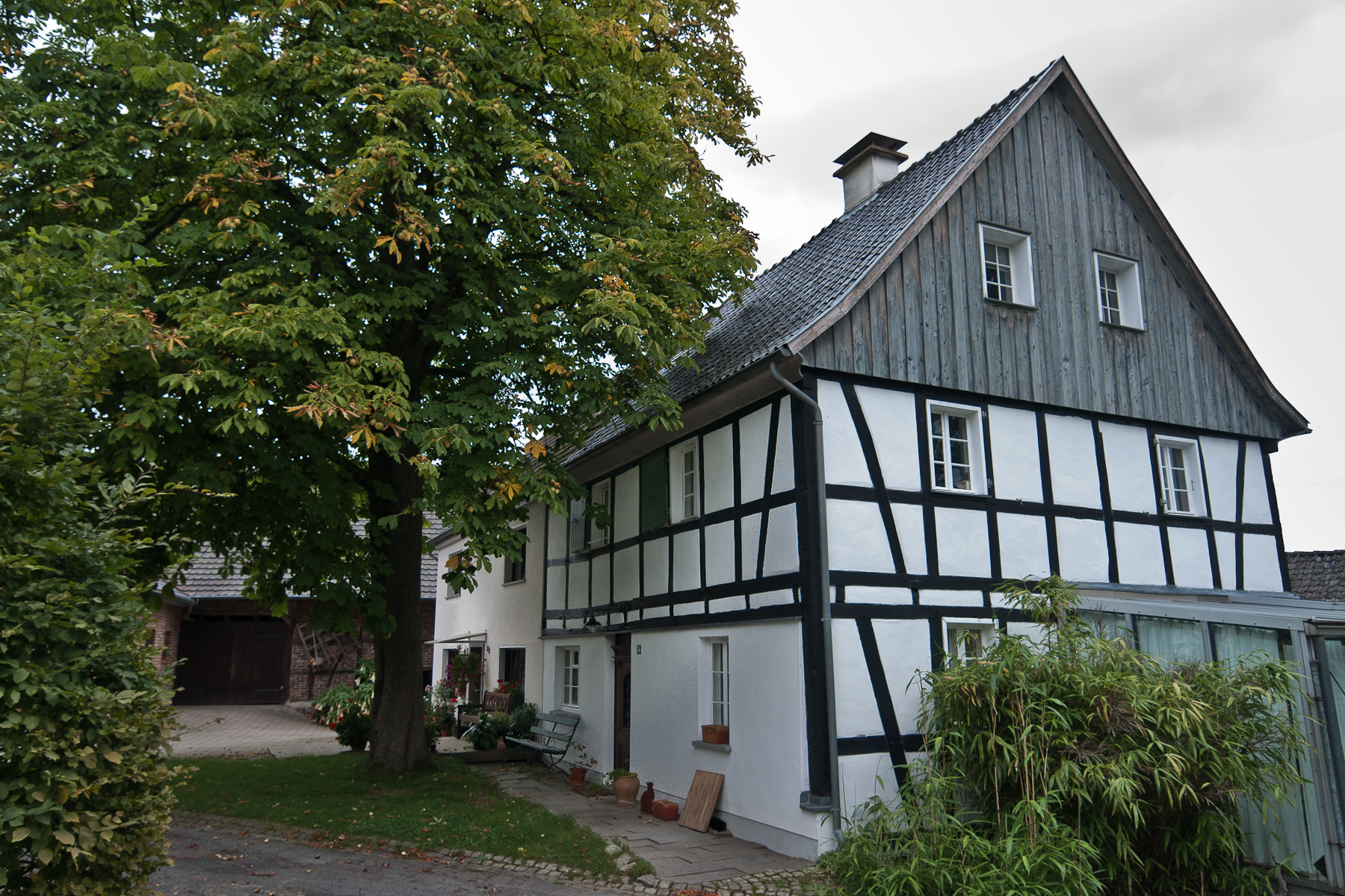 Rösrath, Denkmalnummer 71, Hove 84 This is a photograph of an architectural monument.